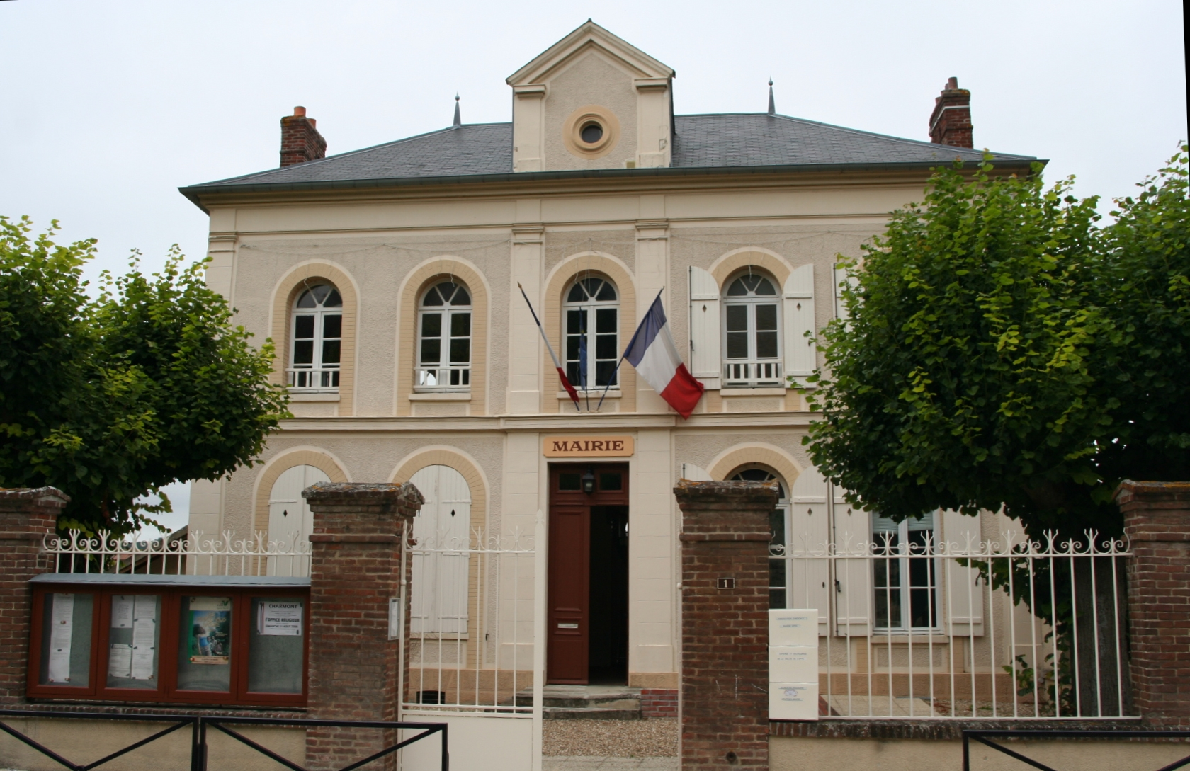 Mairie d'Amenucourt - Val-d'Oise, France